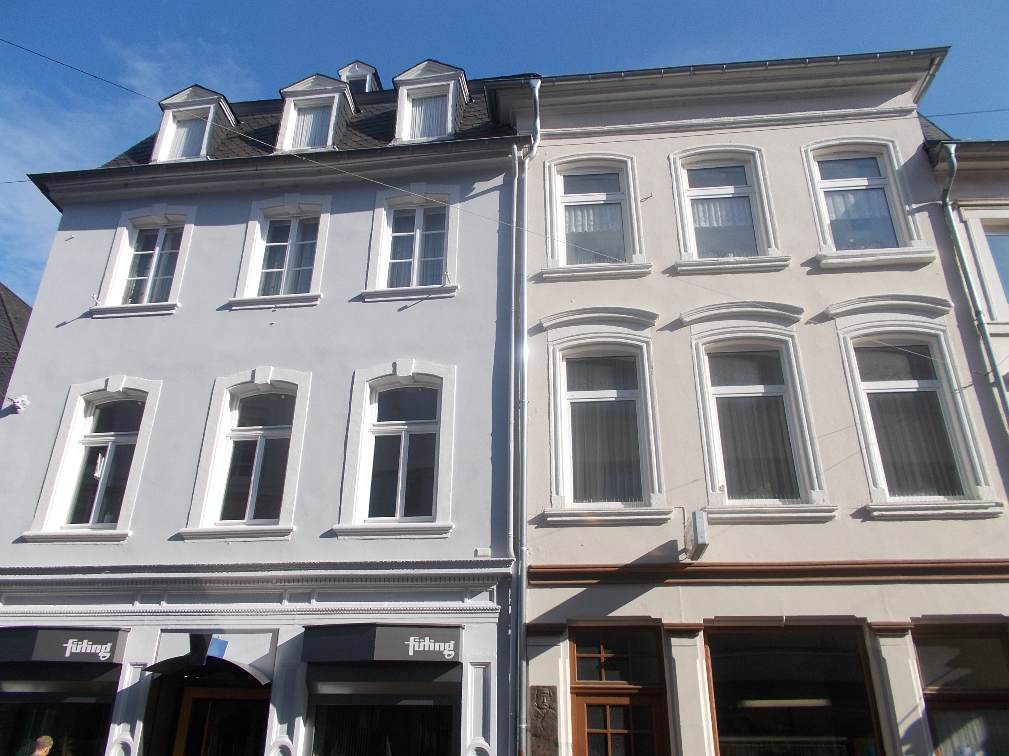 Denkmalzone Brotstraße links